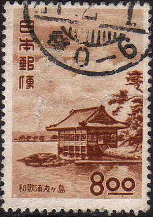 1951年に発行された観光切手、海岸部門の和歌山県にある和歌浦を描く切手